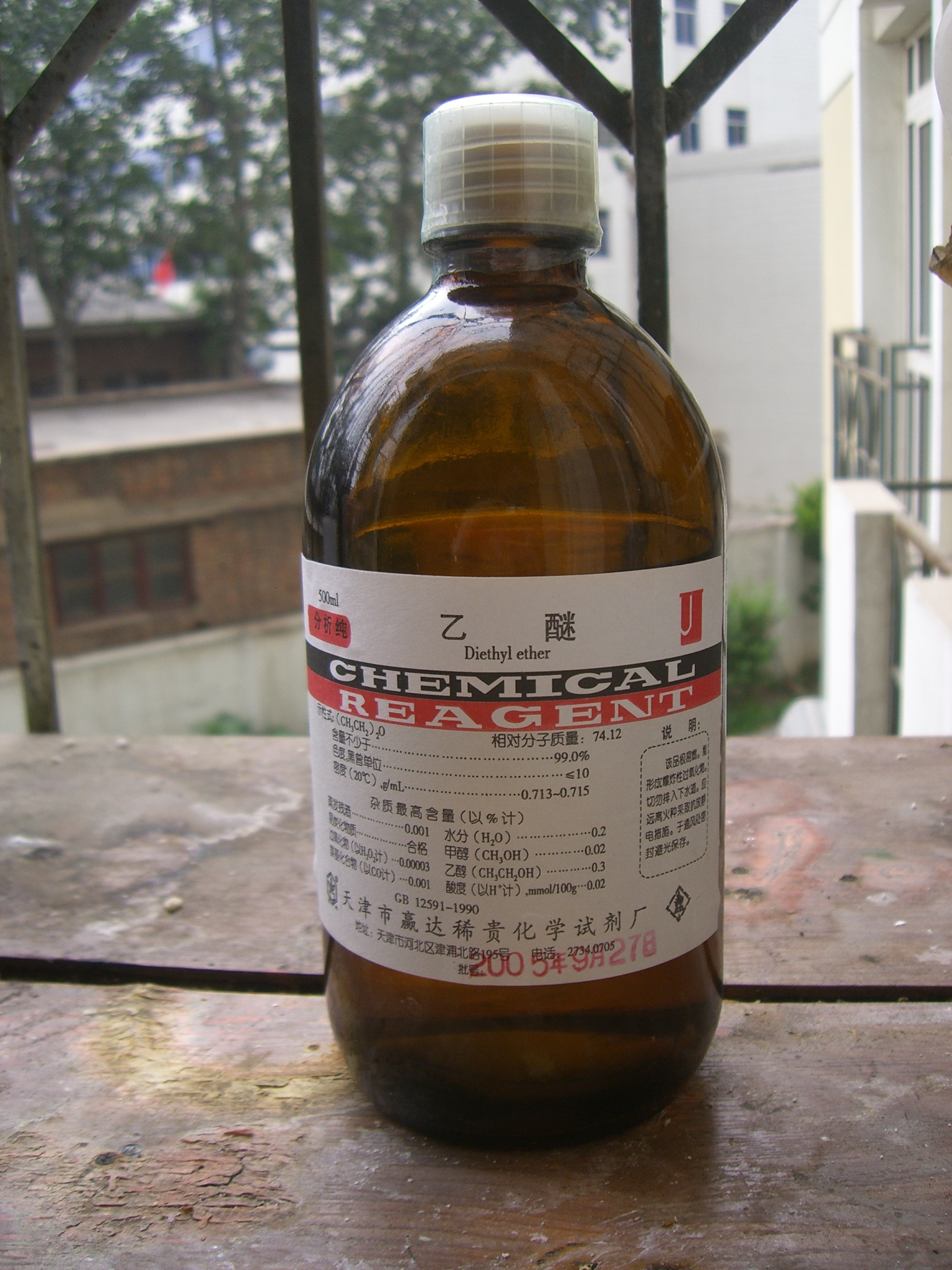 Diethyl ether